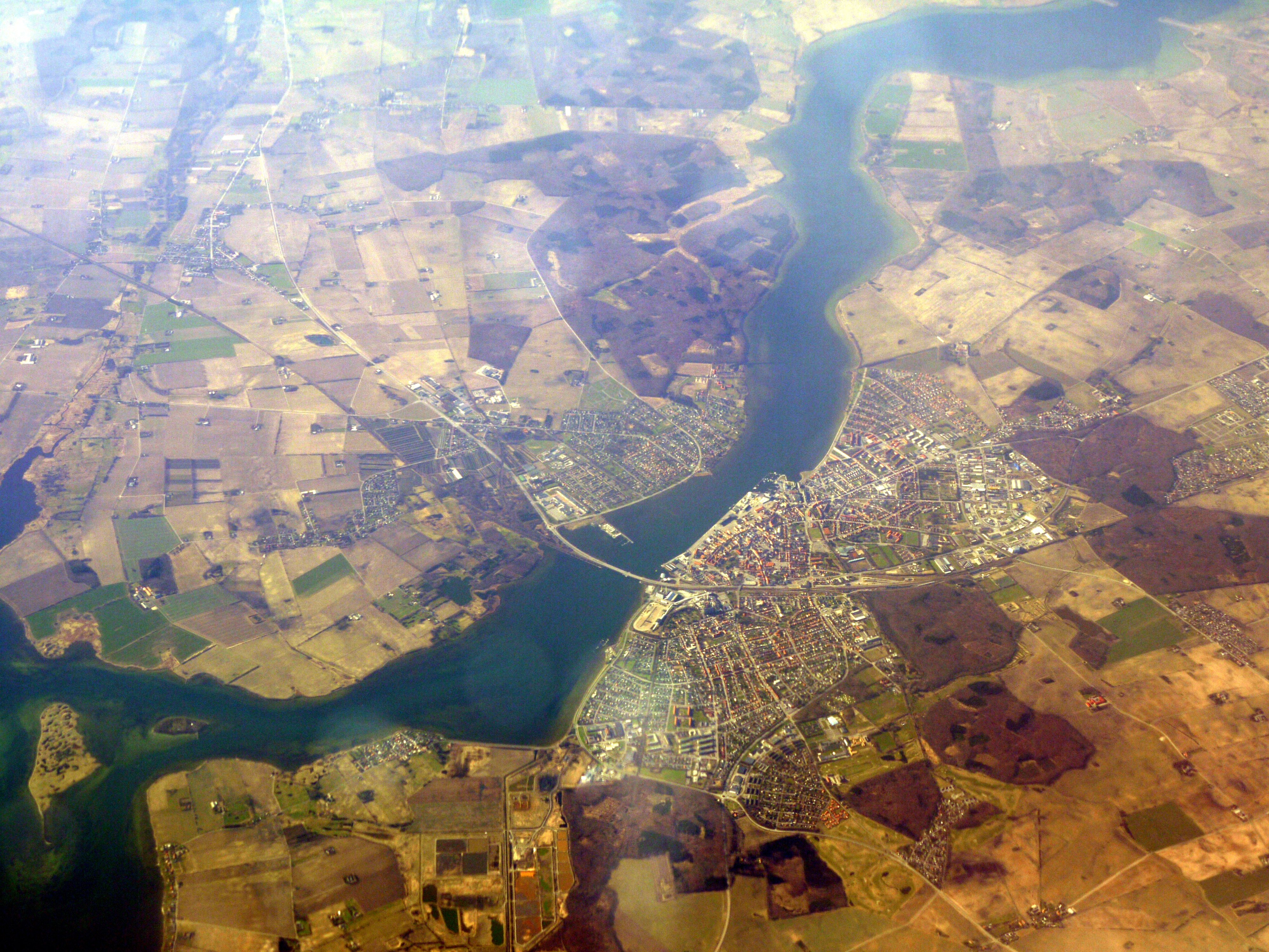 Nykøbing Falster fra oven.